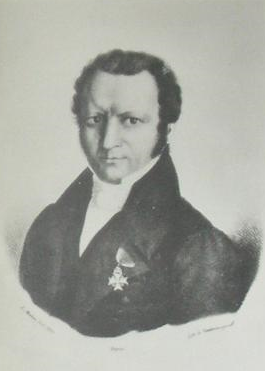 Charles Lehon, ministre d'État belge